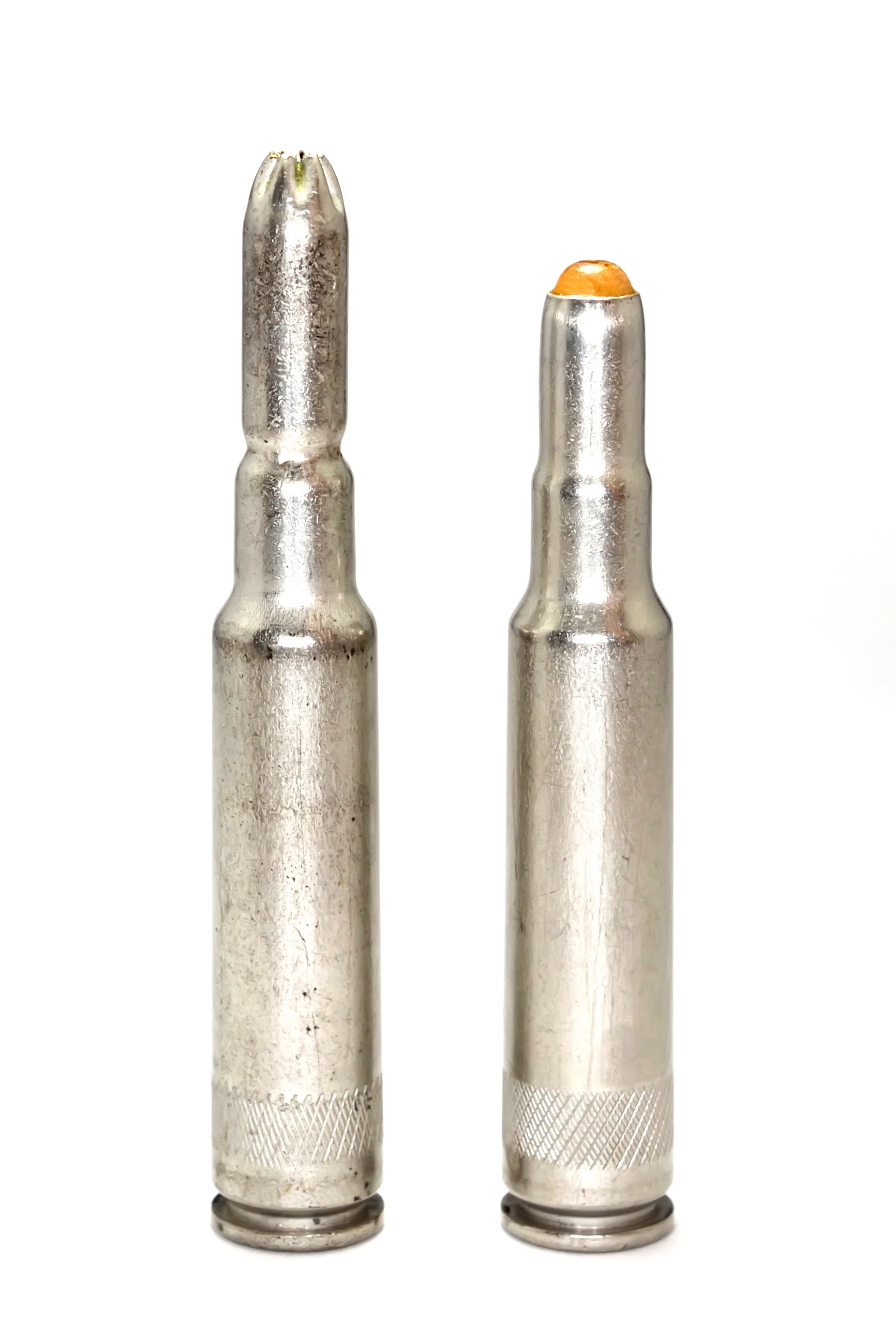 GP11 Cartouche propulsive 44 et sa variante pour les grenades antichar Pz-WG. 44, Ex-WG et Pz-WG. 48